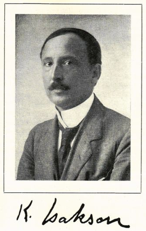 Karl Isakson